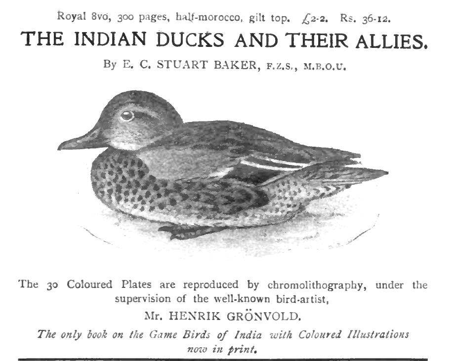 advert for E C Stuart Baker's book